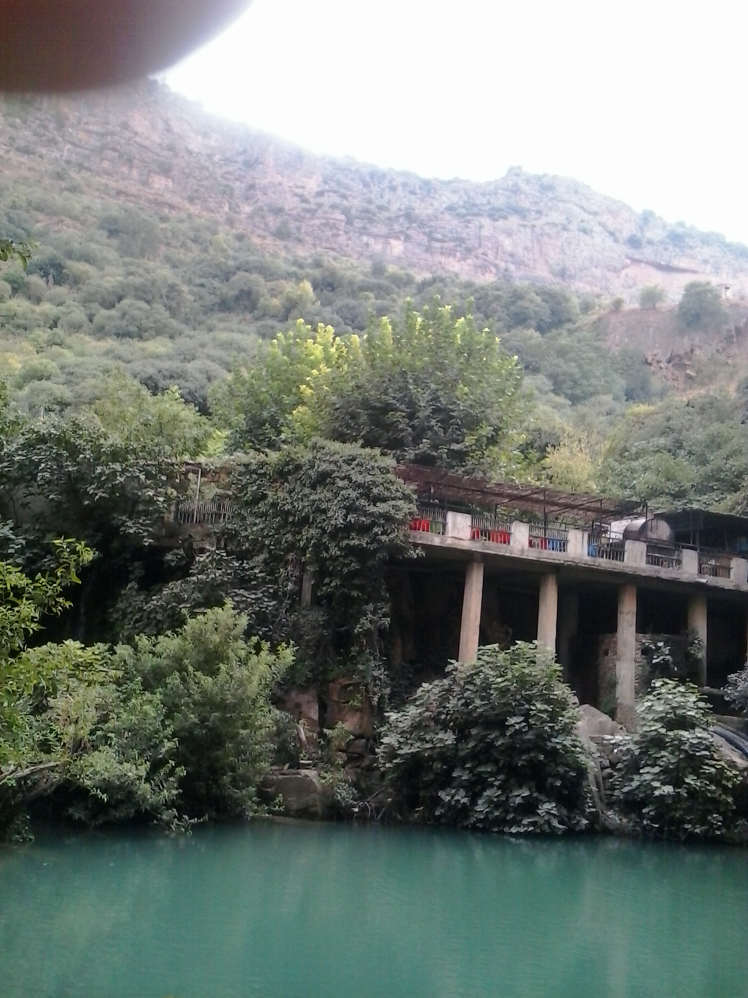 Cascade d´el ourit Tlemcen